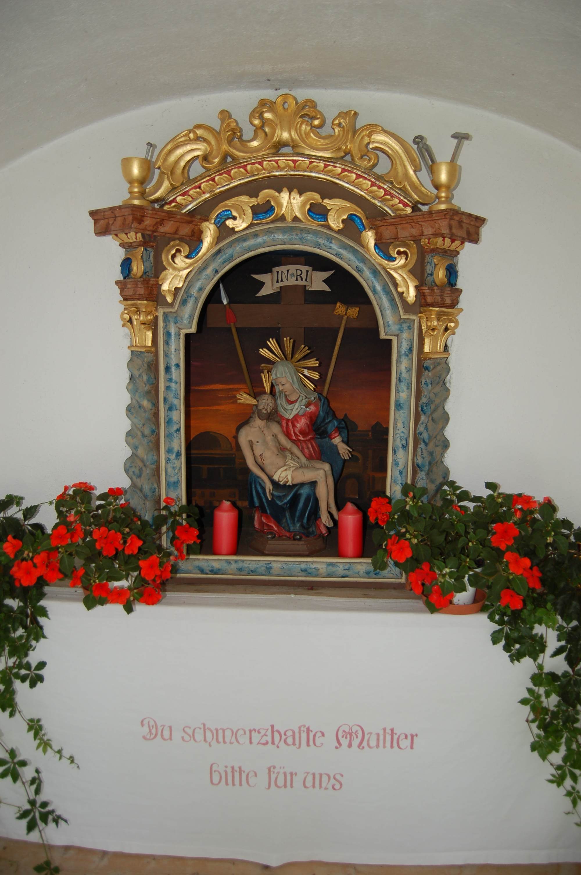 Die denkmalgeschützte Wegkapelle Ketterle am Weg von Obermauern nach Virgen.